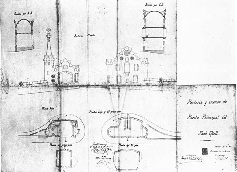 Planta y alzado de los pabellones de entrada al Parque Güell, de Antoni Gaudí (1904).